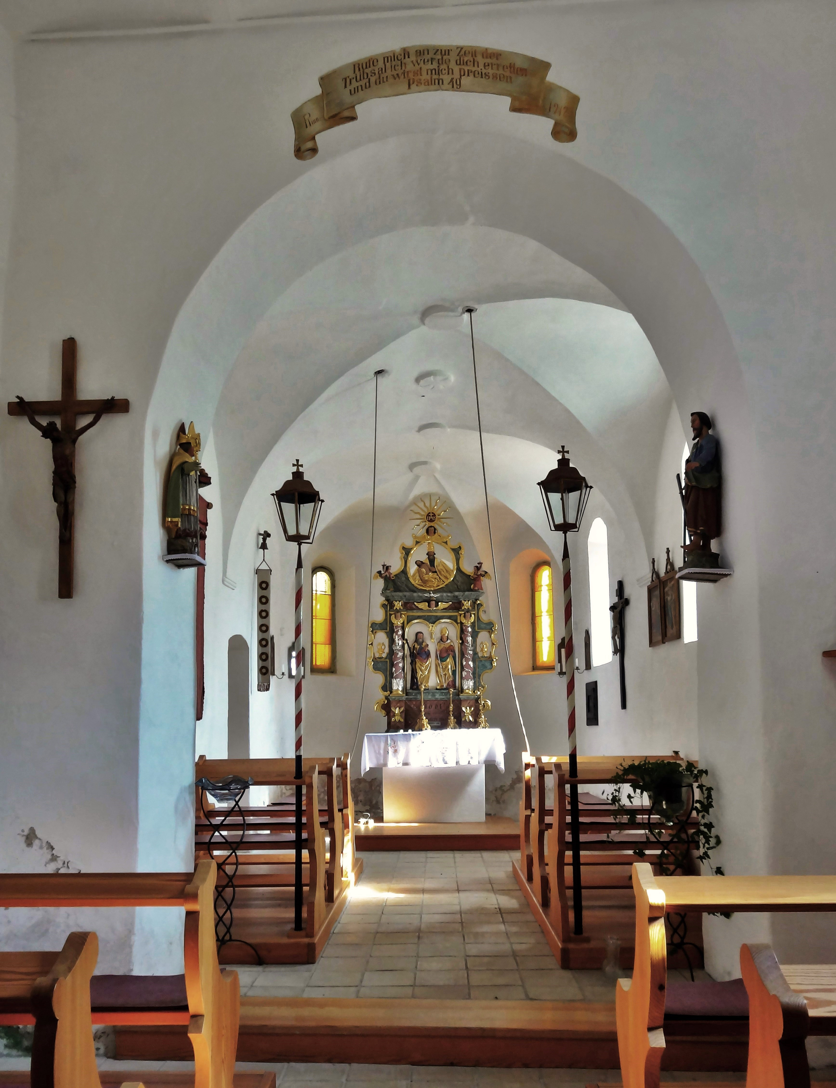 Kath. Filialkirche Heilige Andreas und Nikolaus in Knasweg, Innenansicht, Blick vom Langhaus in den Chorraum